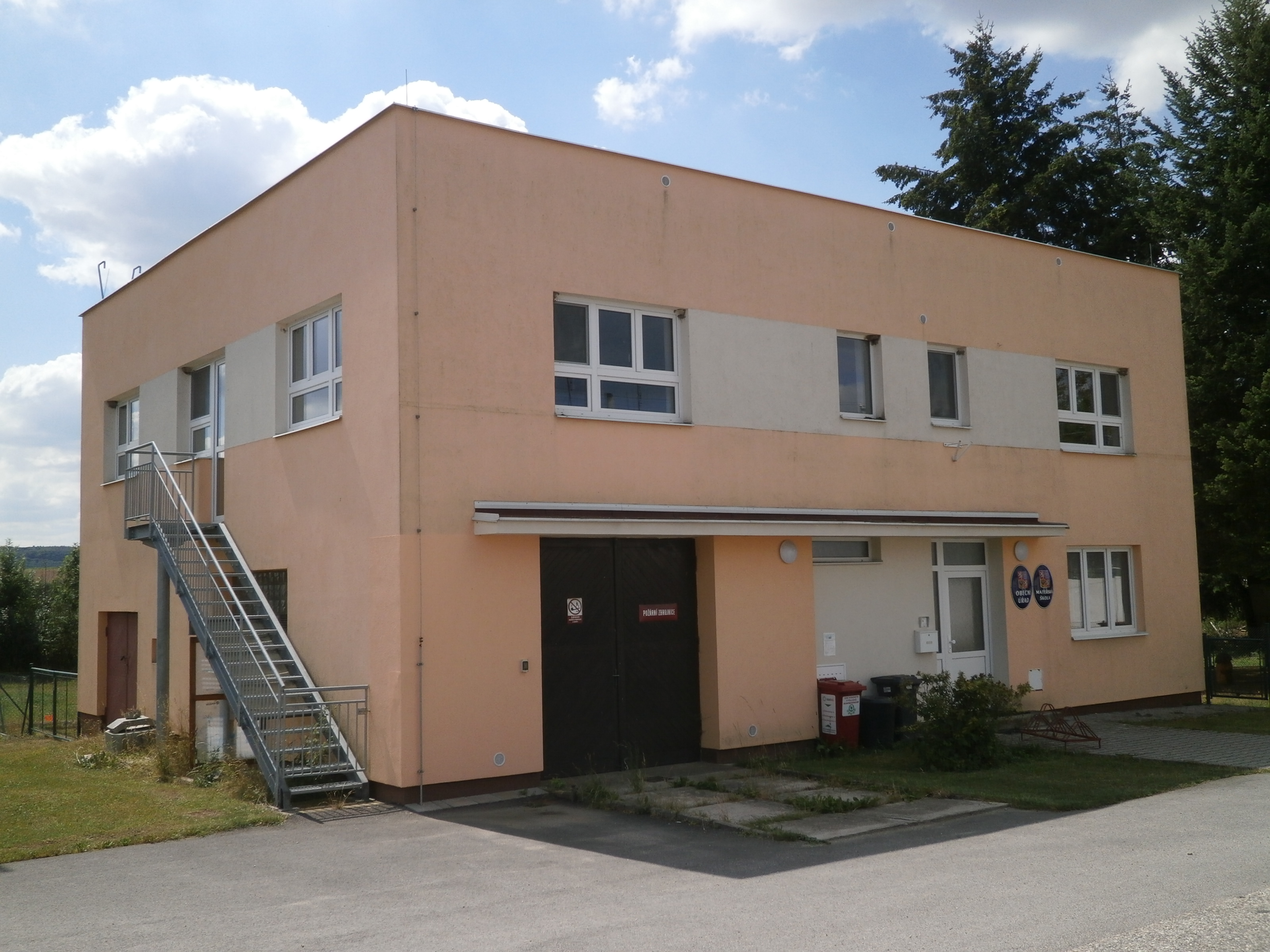 Rohatsko - č.p. 15, obecní úřad, mateřská škola a požární zbrojnice